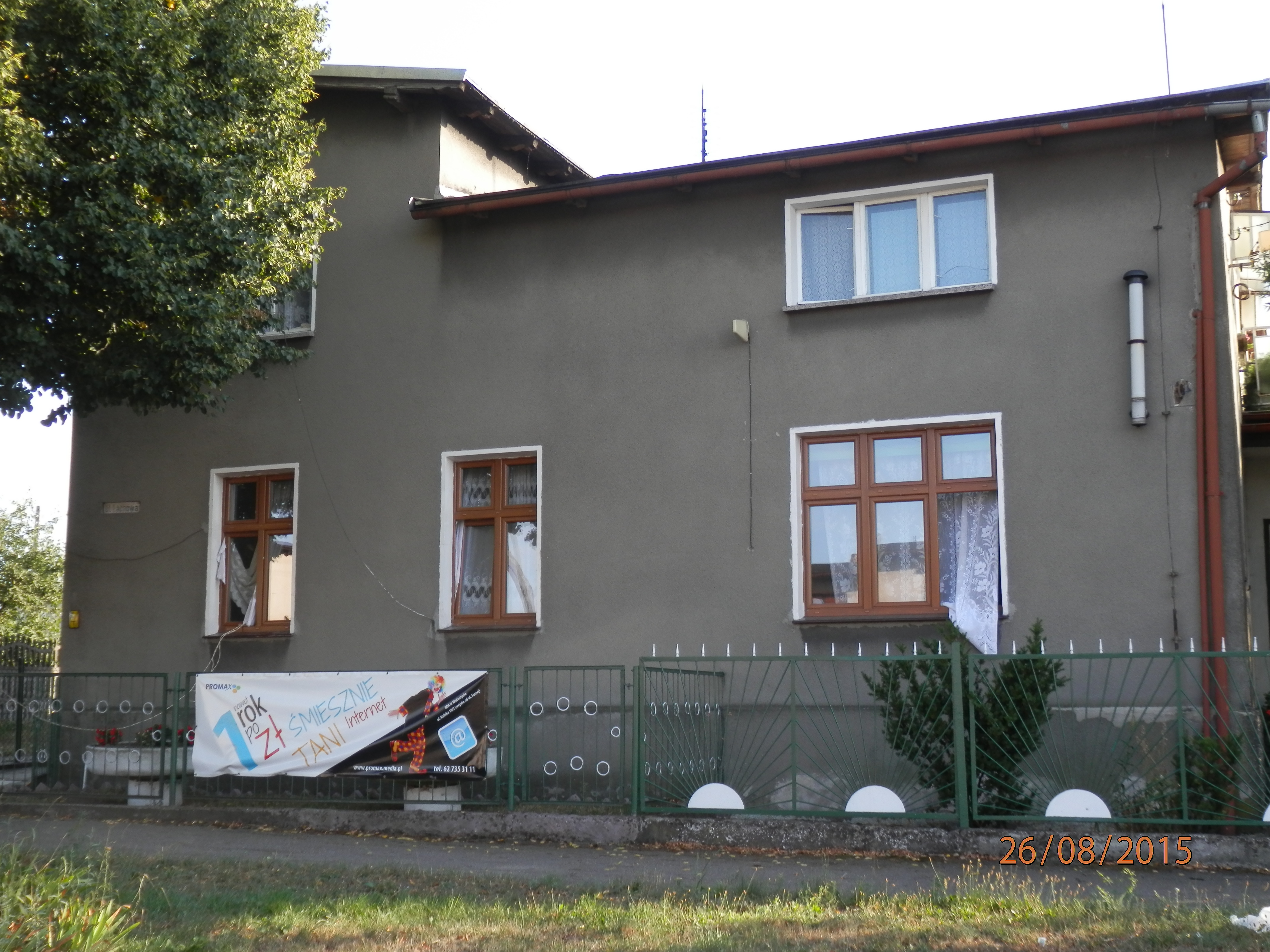 Budynek przy ul. Łacnowej 1, stan obecny po przróbkach.